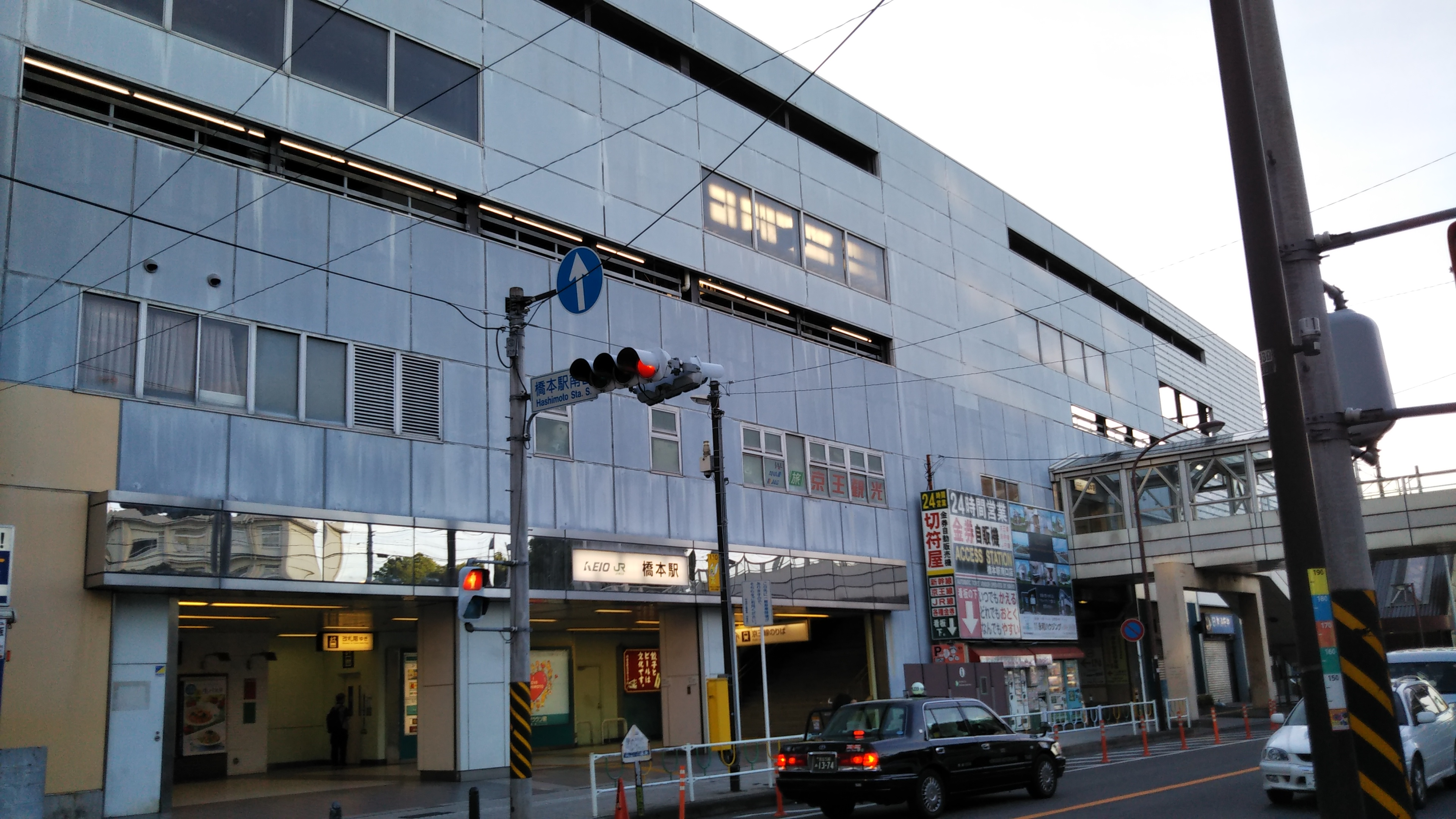 橋本駅南口